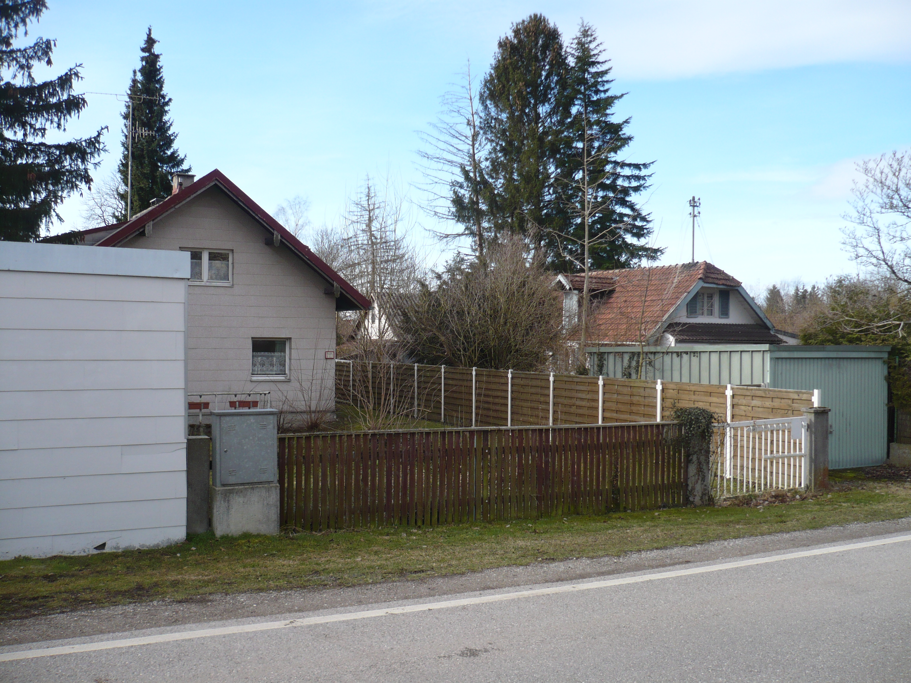 Alte Häuser München, Brodersenstraße östlich der S-Bahn